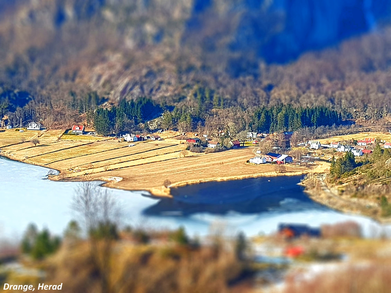 Drange i Herad i Farsund kommune i Vest-Agder fylke. (Tiltshift-effekt)